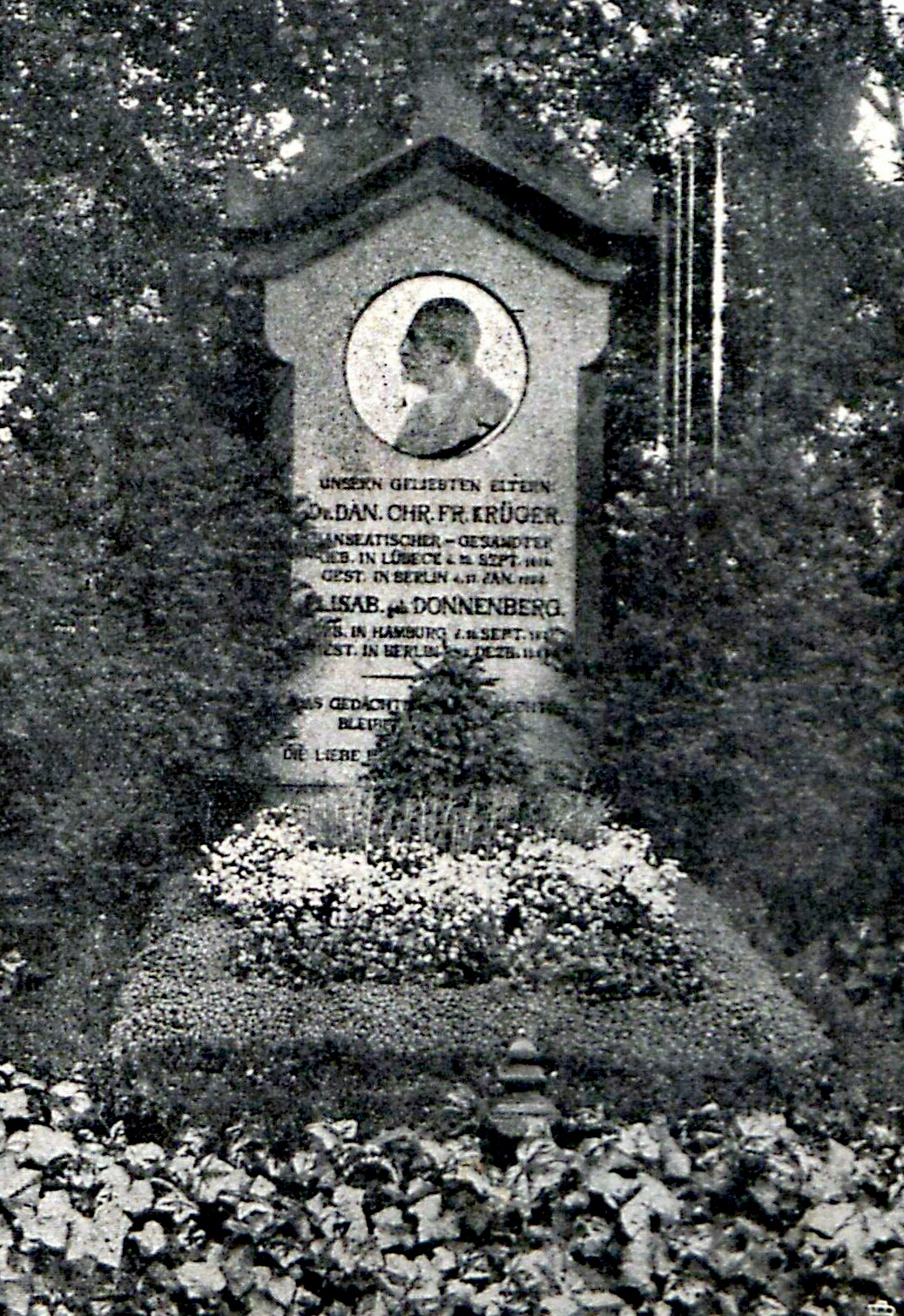 Grabmal des Ministers Dr. Friedrich Krüger auf dem Allgemeinen Gottesacker zu Lübeck.